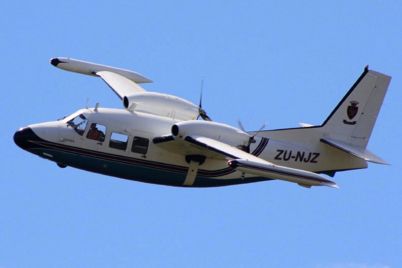 Piaggio P166 Albatross ZU-NJZ (Ex SAAF 898) (2)